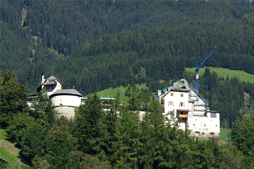 Schloss